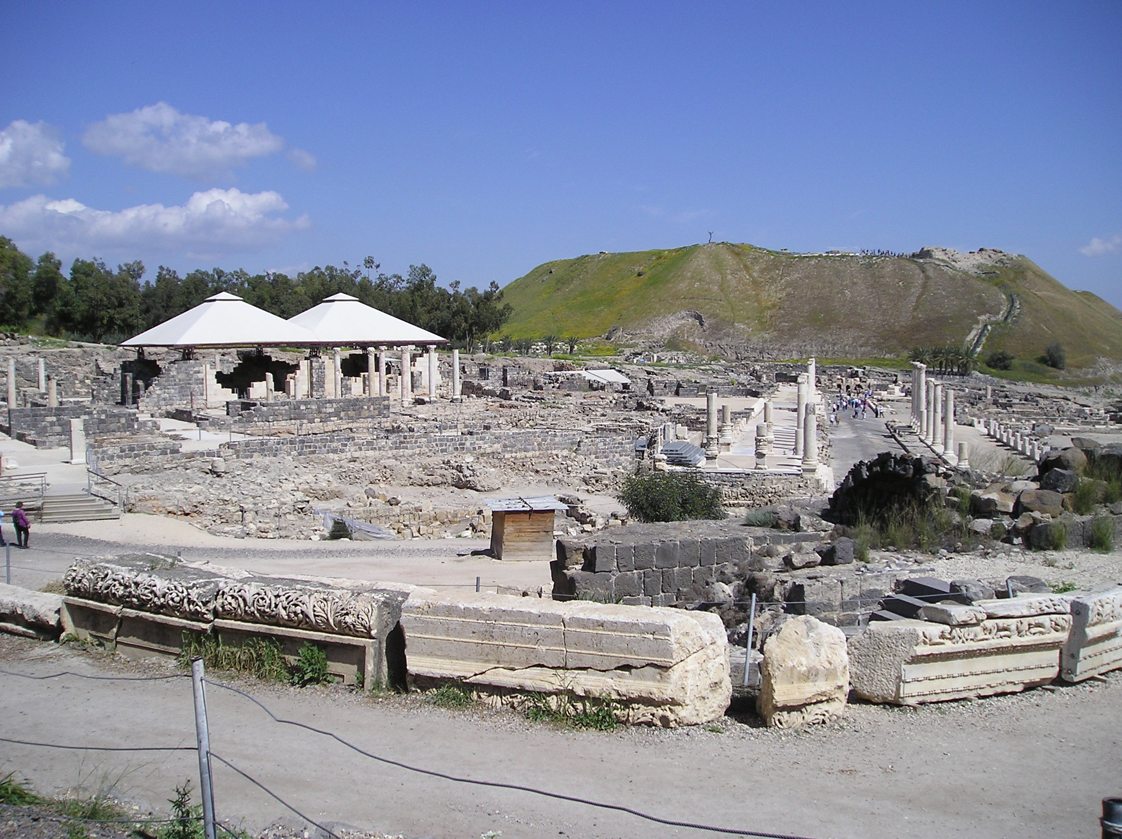 Bet Szean (stanowisko archeologiczne - Scytopolis) w Izraelu. Widok od strony wejścia na teren parku archeologicznego. Na pierwszym planie pozostałości łaźni bizantyjskich oraz telu.